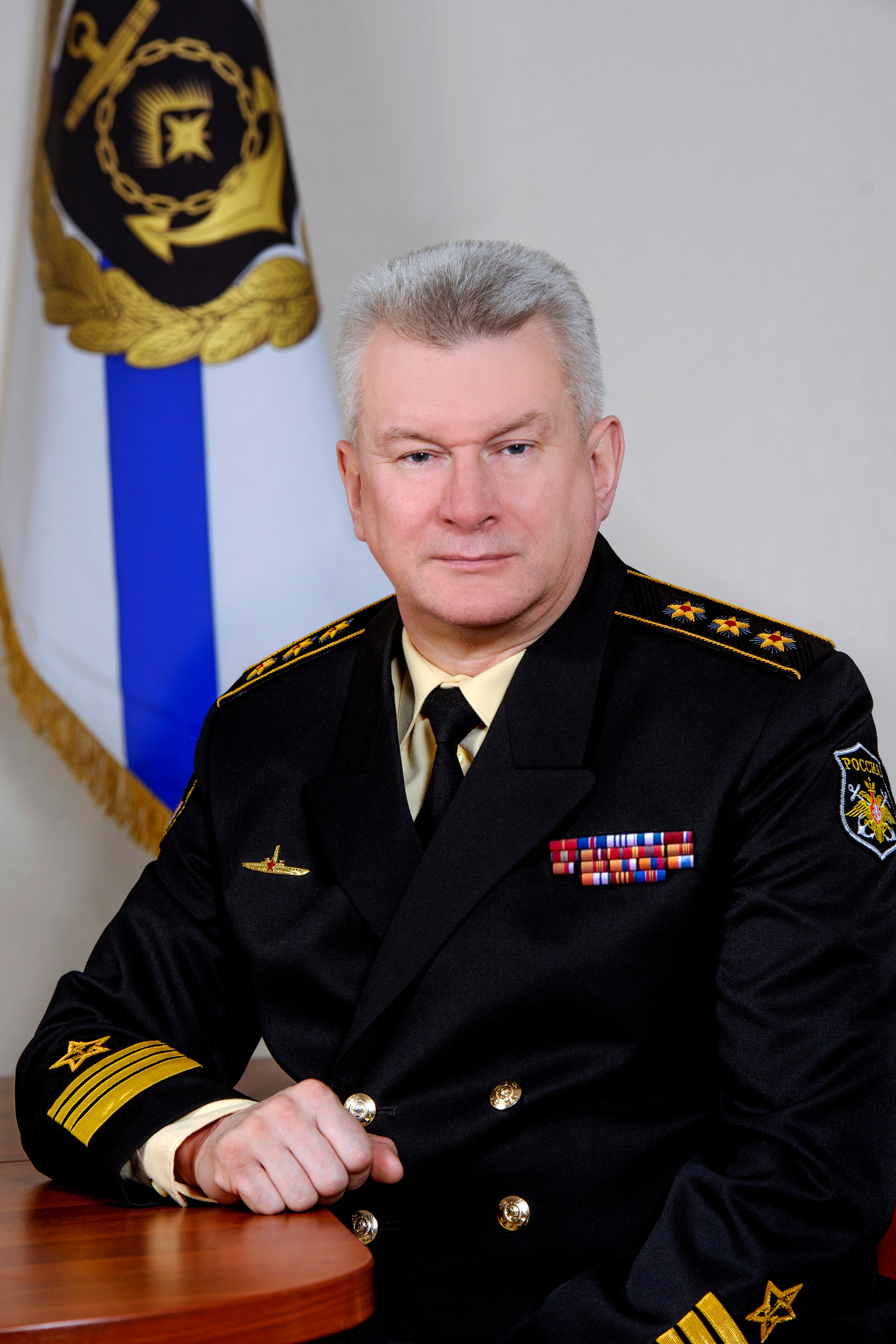 Главнокомандующий Военно-Морским Флотом России адмирал Евменов Николай Анатольевич